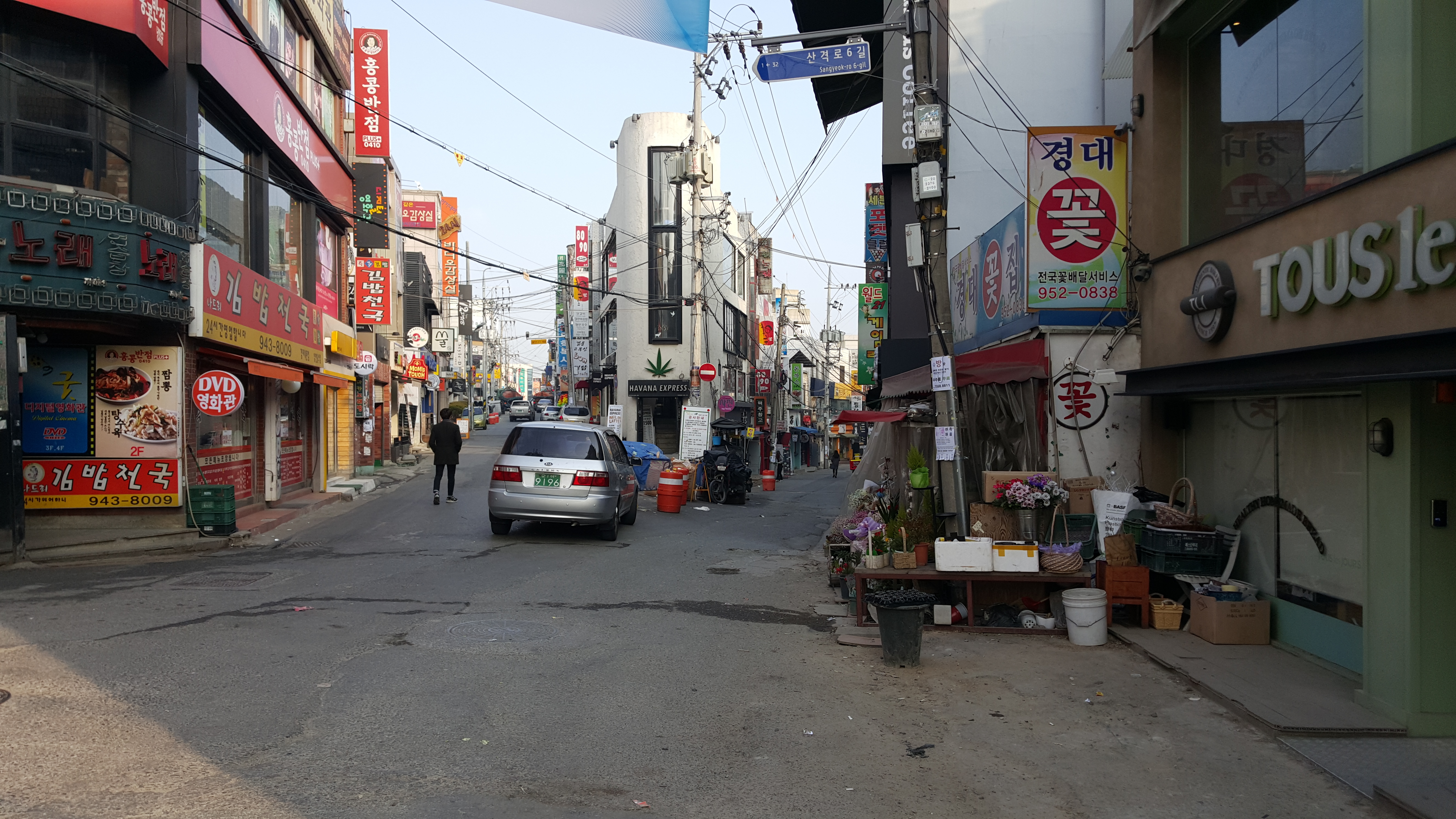 2016년 1월 경북대학교 북문 건너편 거리의 전경